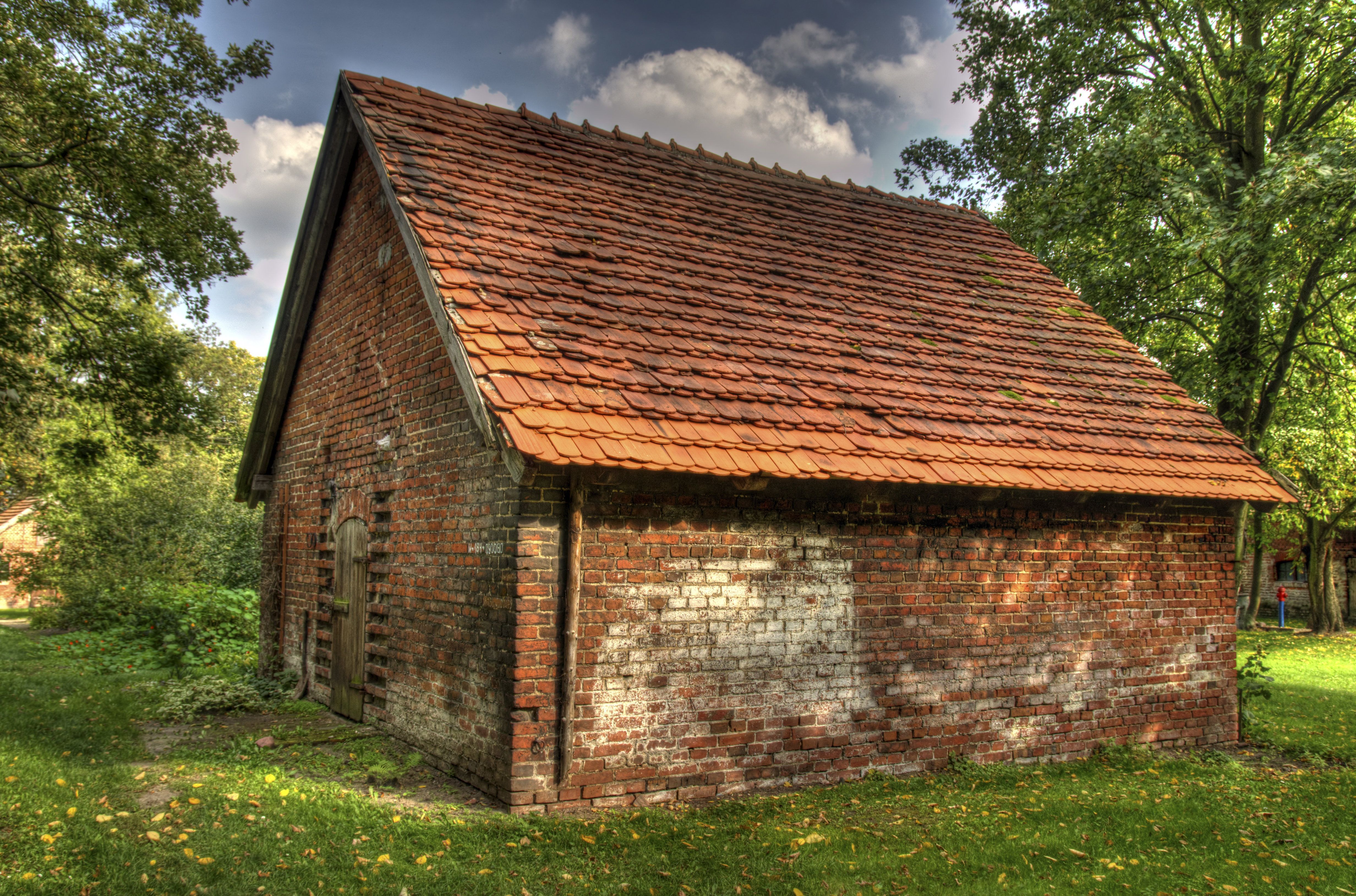 zespół folwarczny z 2. poł. XIX w.: 2 obory, kuźnia i stelmacharnia, gorzelnia z domem mieszkalnym, 2 stodoły, stajnia koni wyjazdowych, dom rządcy i stajnia koni roboczych, spichrz, cielętnik, mleczarnia, stajnia, ob. magazyn, garaż, garaż pługów parowych, wiata, ogrodzenie mur. Wąsowo, ul. Parkowa 1, Kuślin